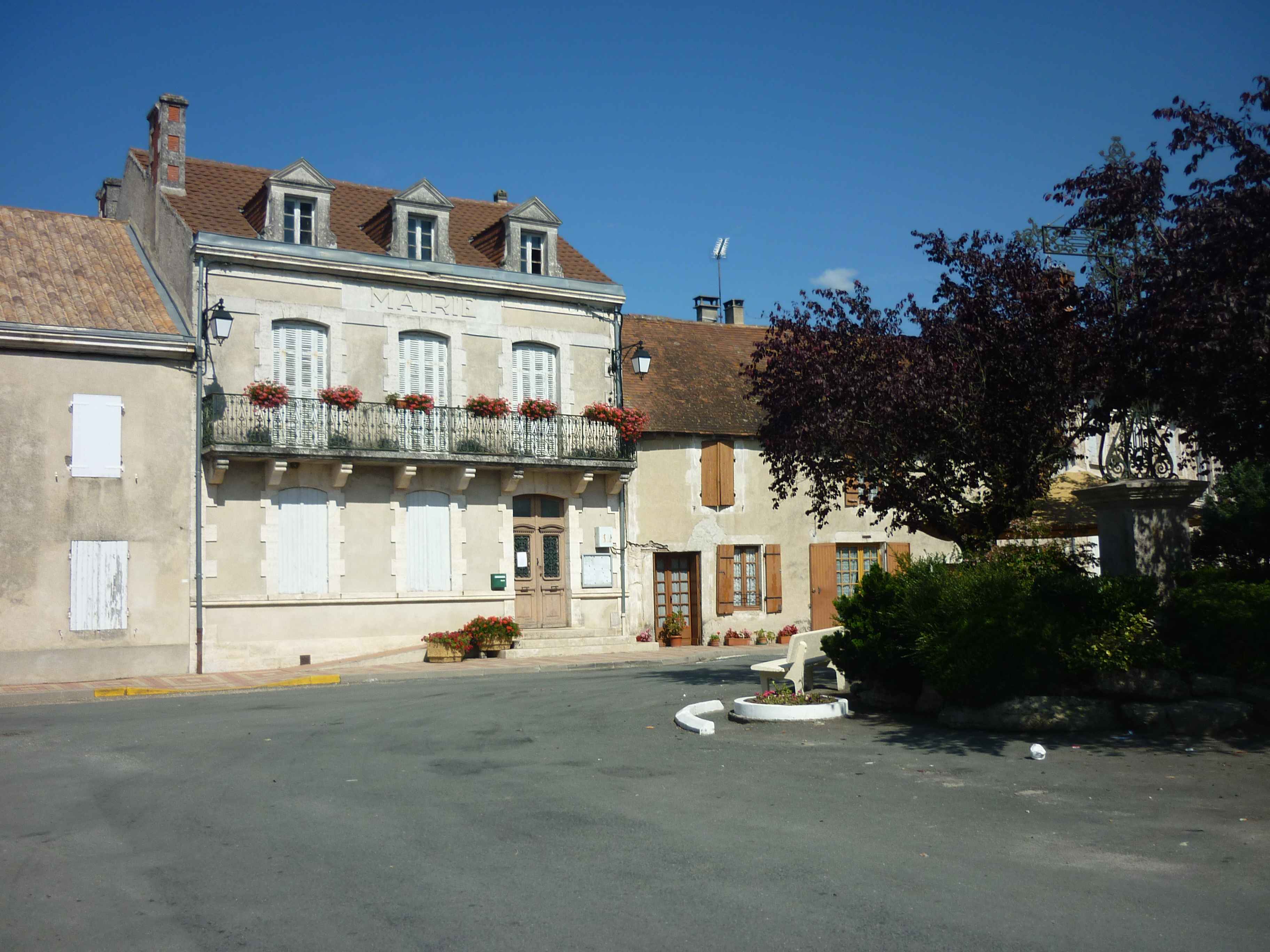 Mairie de Saint-Méard-de-Gurçon (Dordogne).